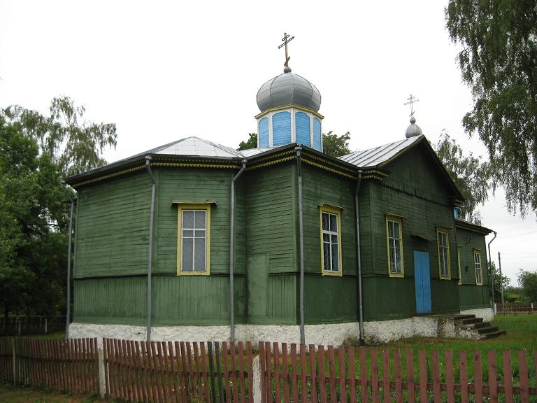 Пераброддзе. Царква Святога Георгія